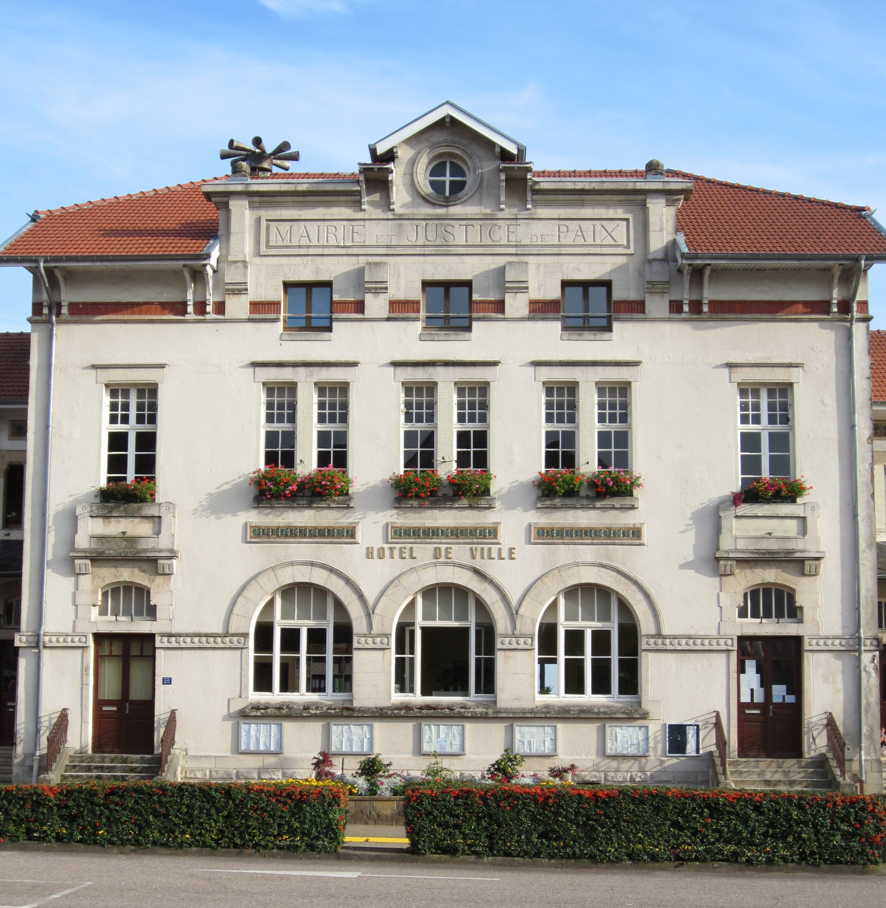 Description mairie Audun Roman mairie Audun Roman